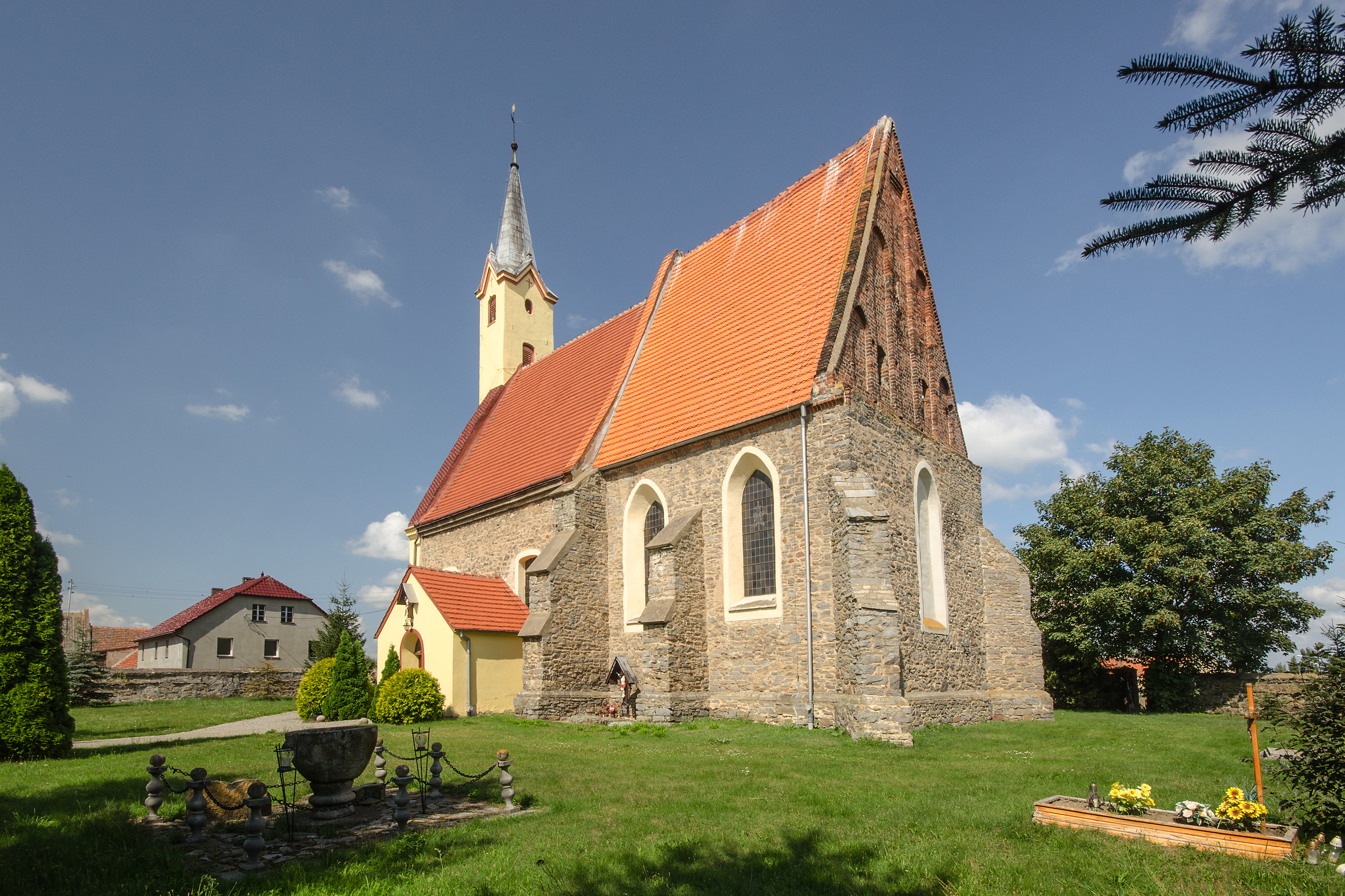 Kucharzowice, kościół par. p.w. św. Andrzeja, kon. XIV, XV, 1803, 1868